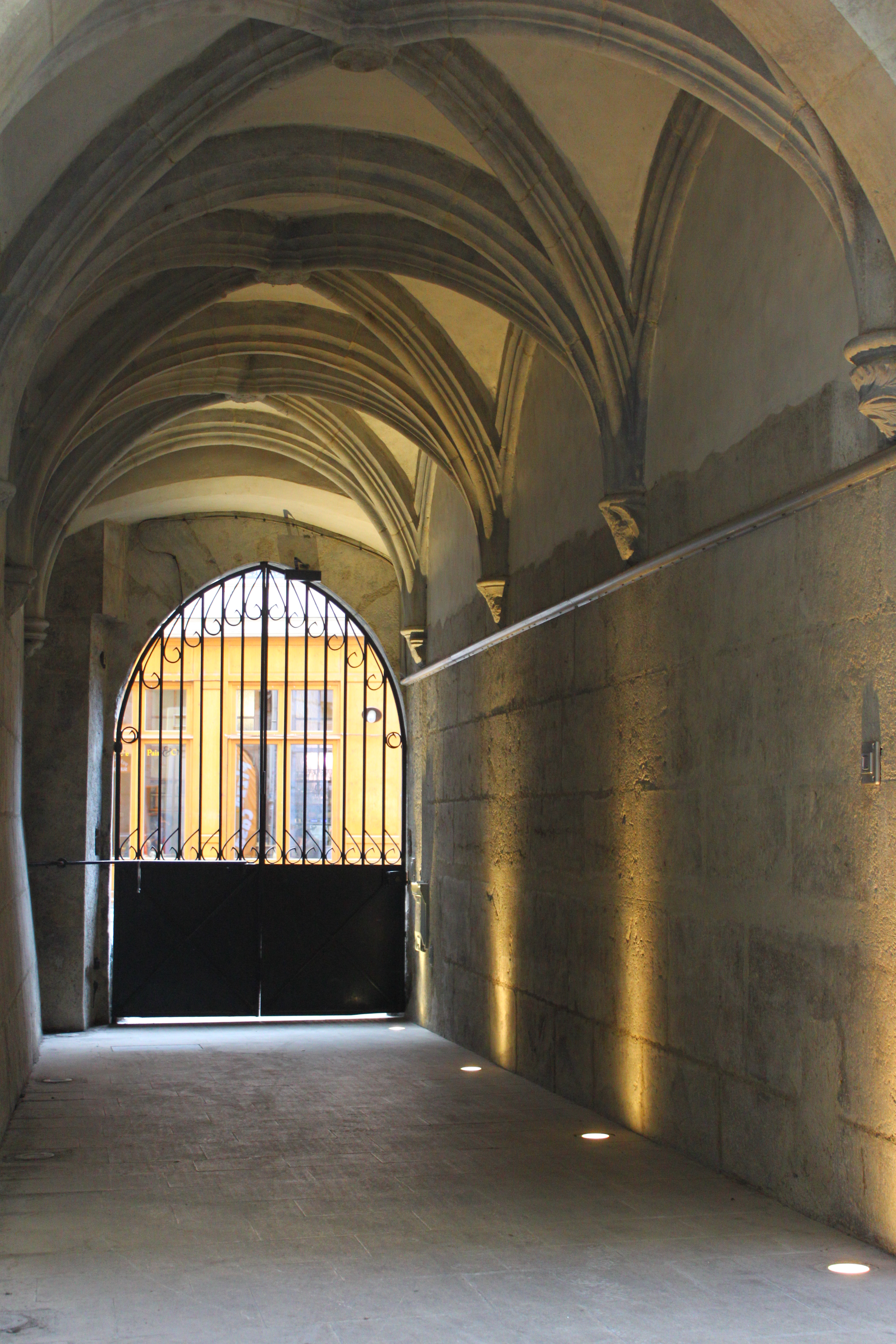 Couloir d'entrée de l'hôtel de François-Marc à Grenoble